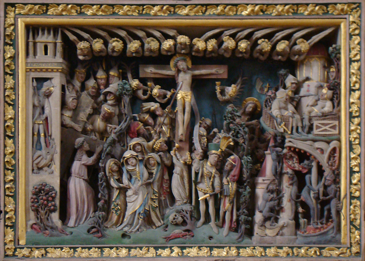 Mittelszene des Flügelaltars im Schweriner Dom, Foto: Peter Schmelzle 2011